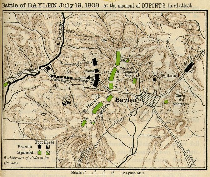 Batalla de Bailen